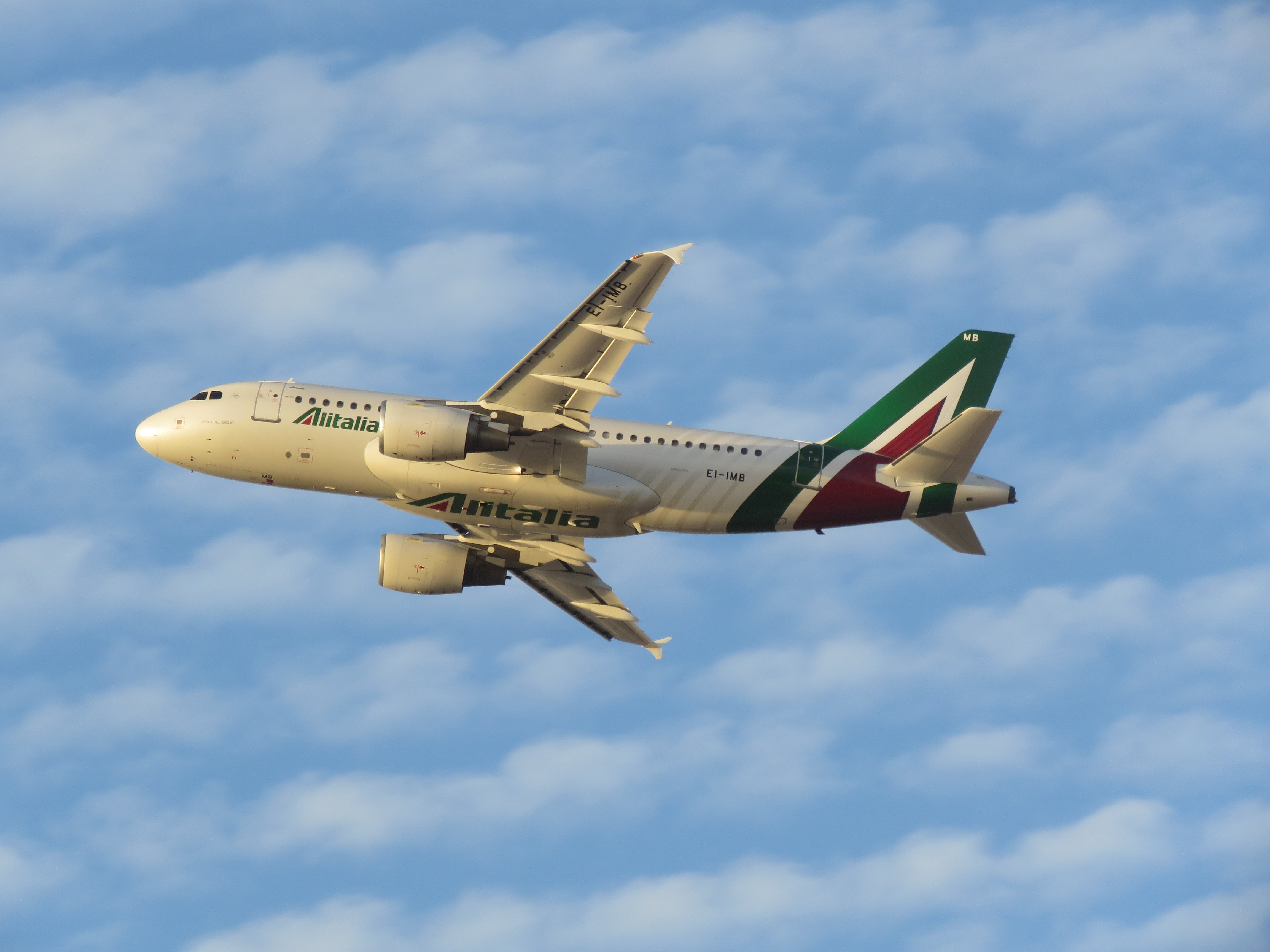 אירבאס A319 של החברה מיד לאחר המראה מבן גוריון.